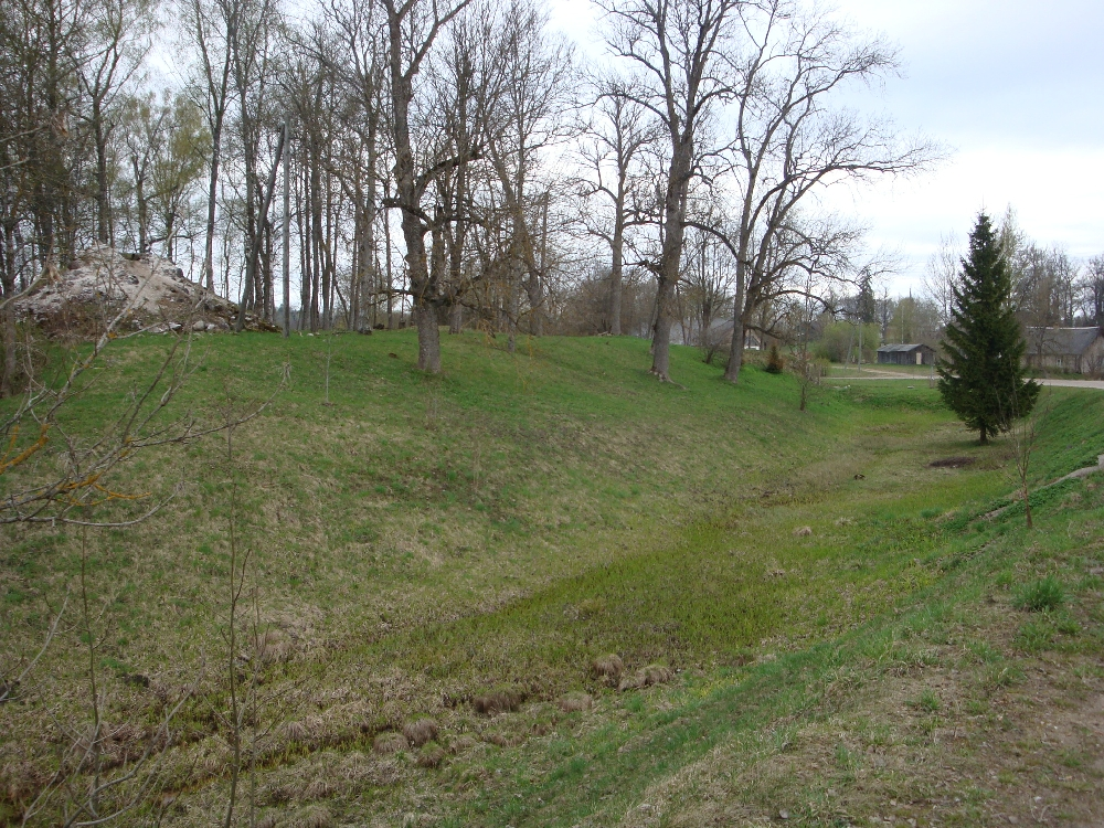 Vaade idapoolsele vallikraavile kagust. Vasakul tõenäoliselt suurtükitorni vare.